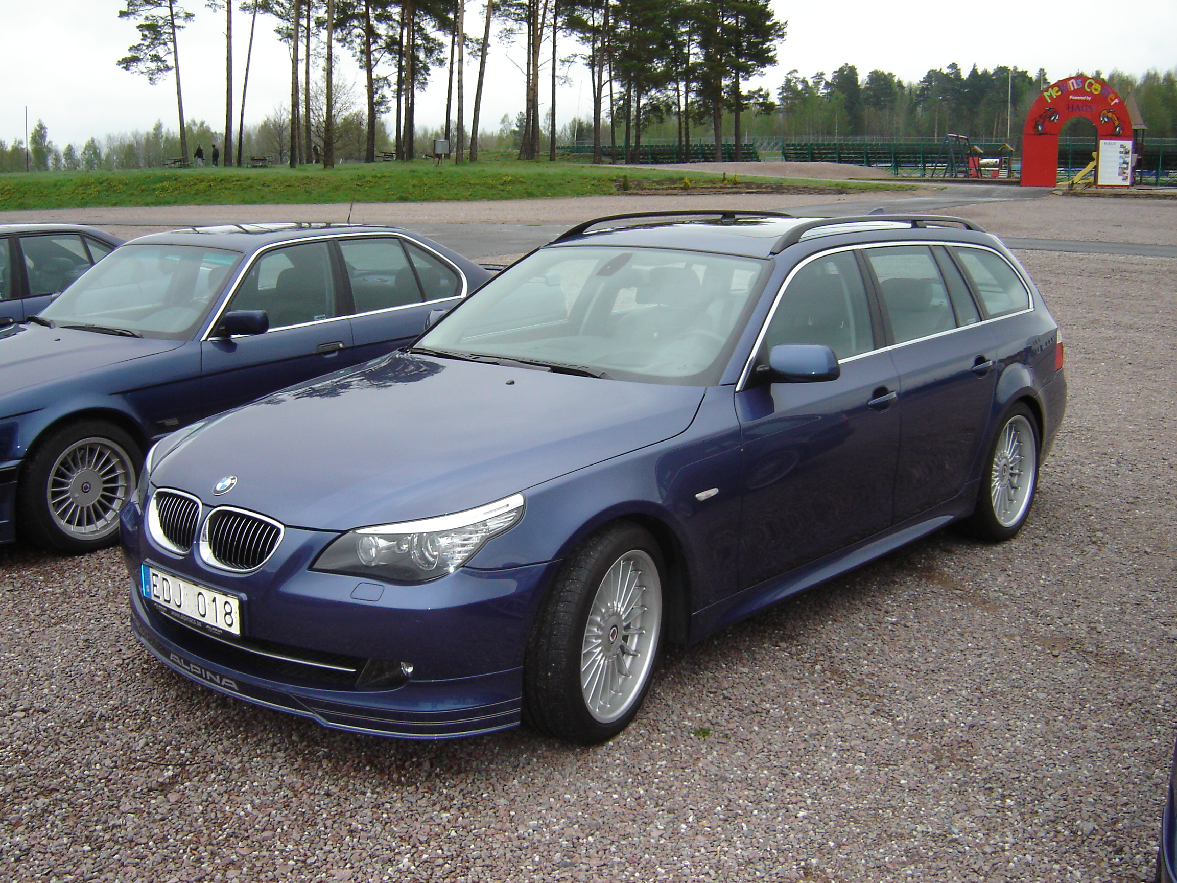 BMW Alpina B5 Touring